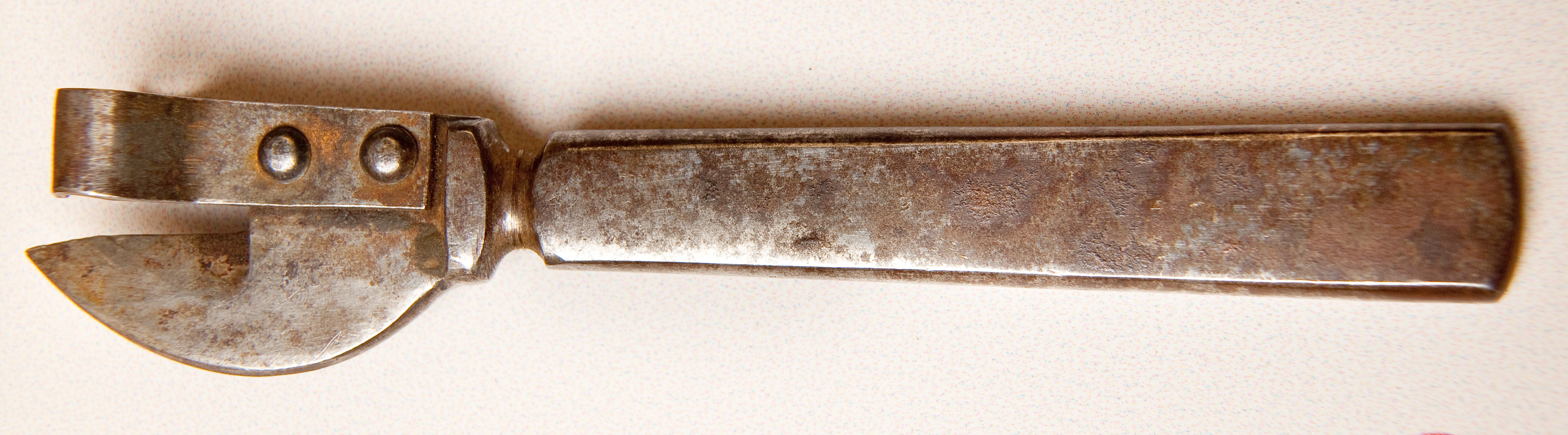 Realizzato interamente in metallo, presenta un manico diritto, una corta lama ricurva e una barra di leva.